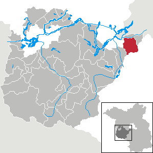 Stahnsdorf in Brandenburg (Country) - District Potsdam-Mittelmark